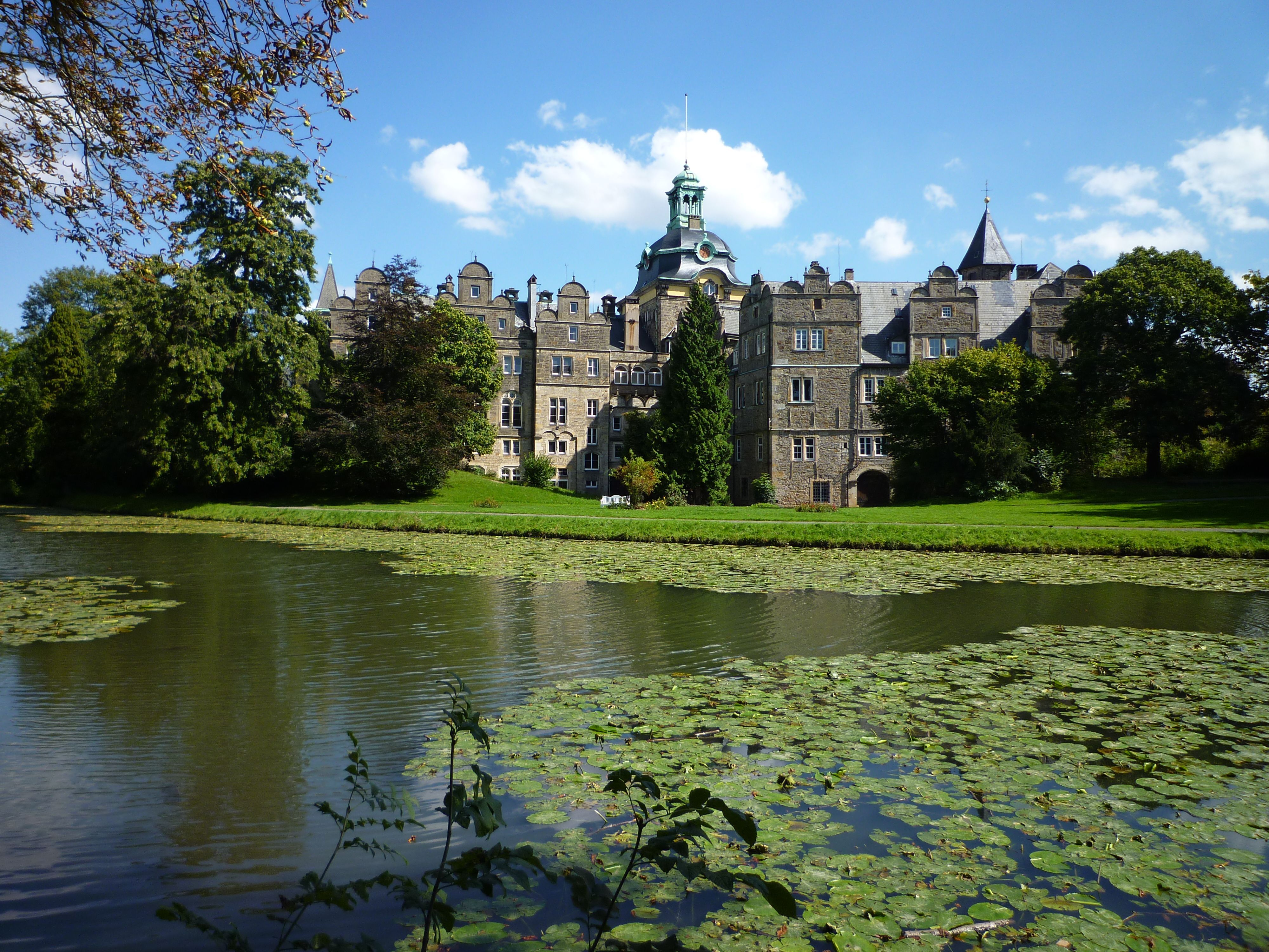 Bückeburg - Wasserschloss ab 1304, heutige Ansicht 16. Jh.